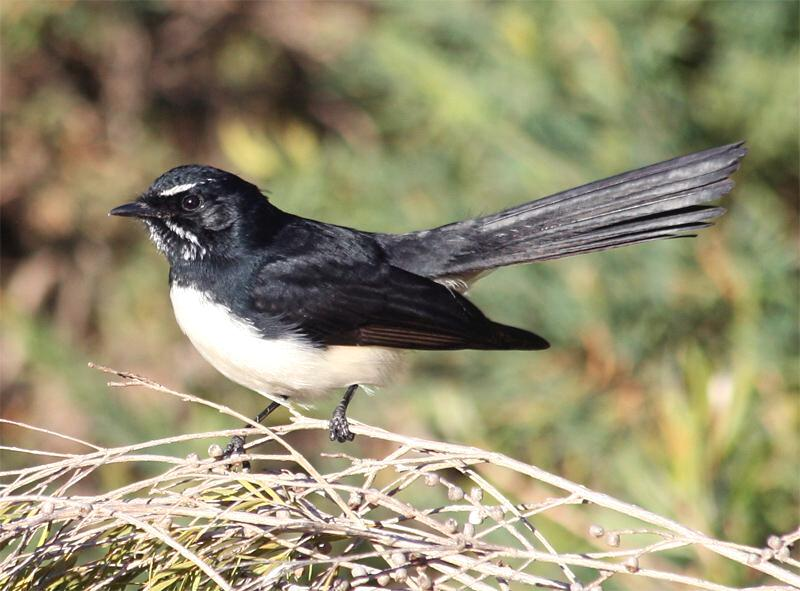 Willie Wagtail